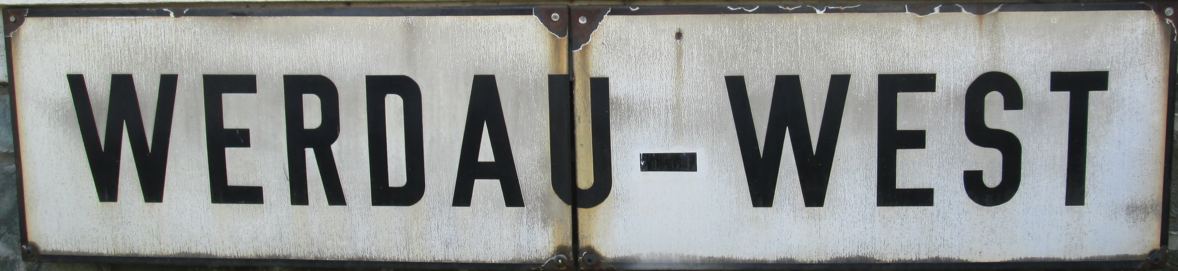 Eisenbahnschild Werdau-West